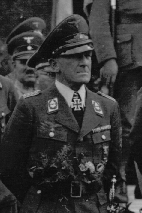 German paratroop general Eugen Meindl 1941